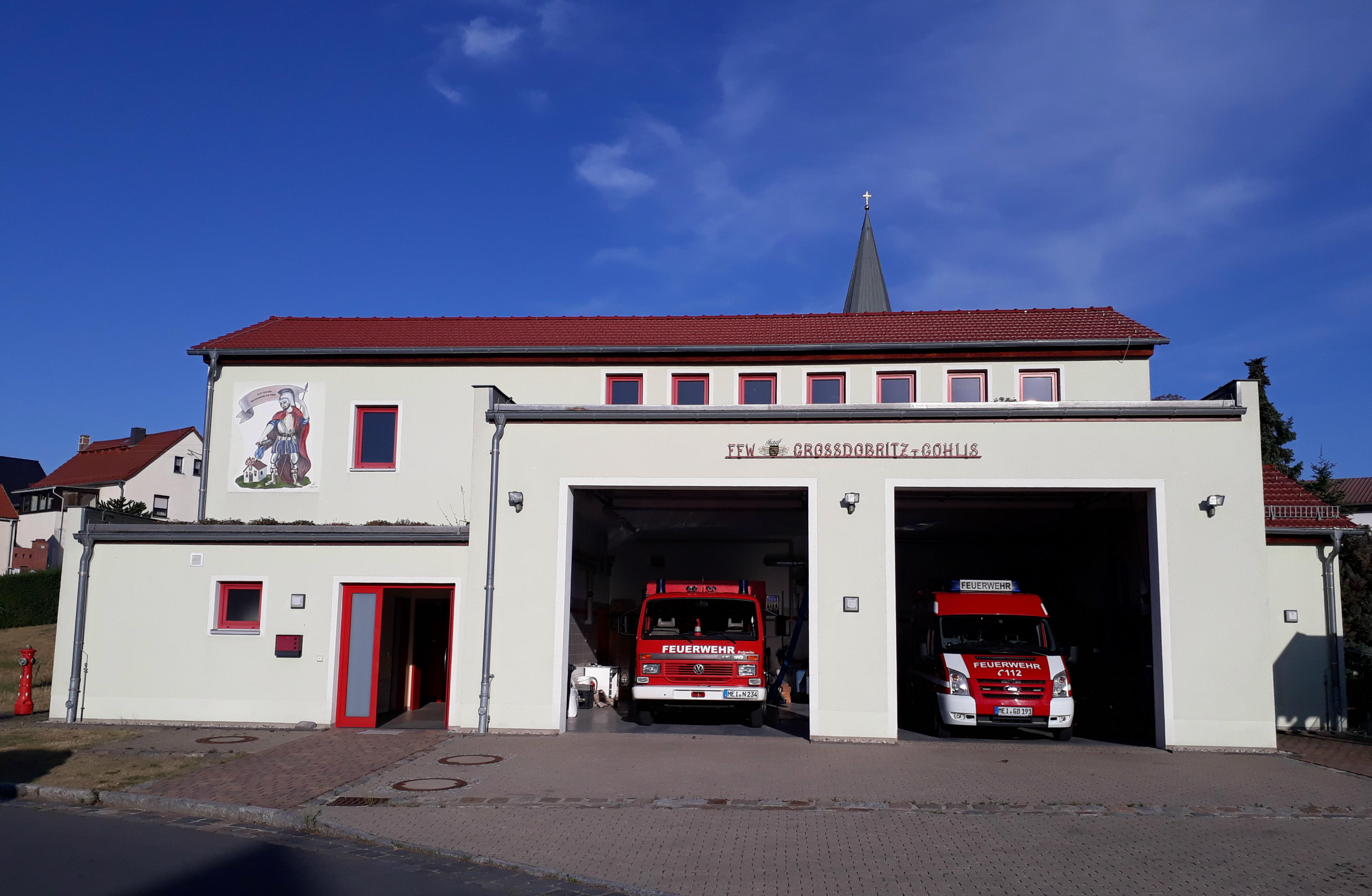 Gerätehaus der Freiwilligen Feuerwehr Großdobritz/Gohlis, eingeweiht 2009